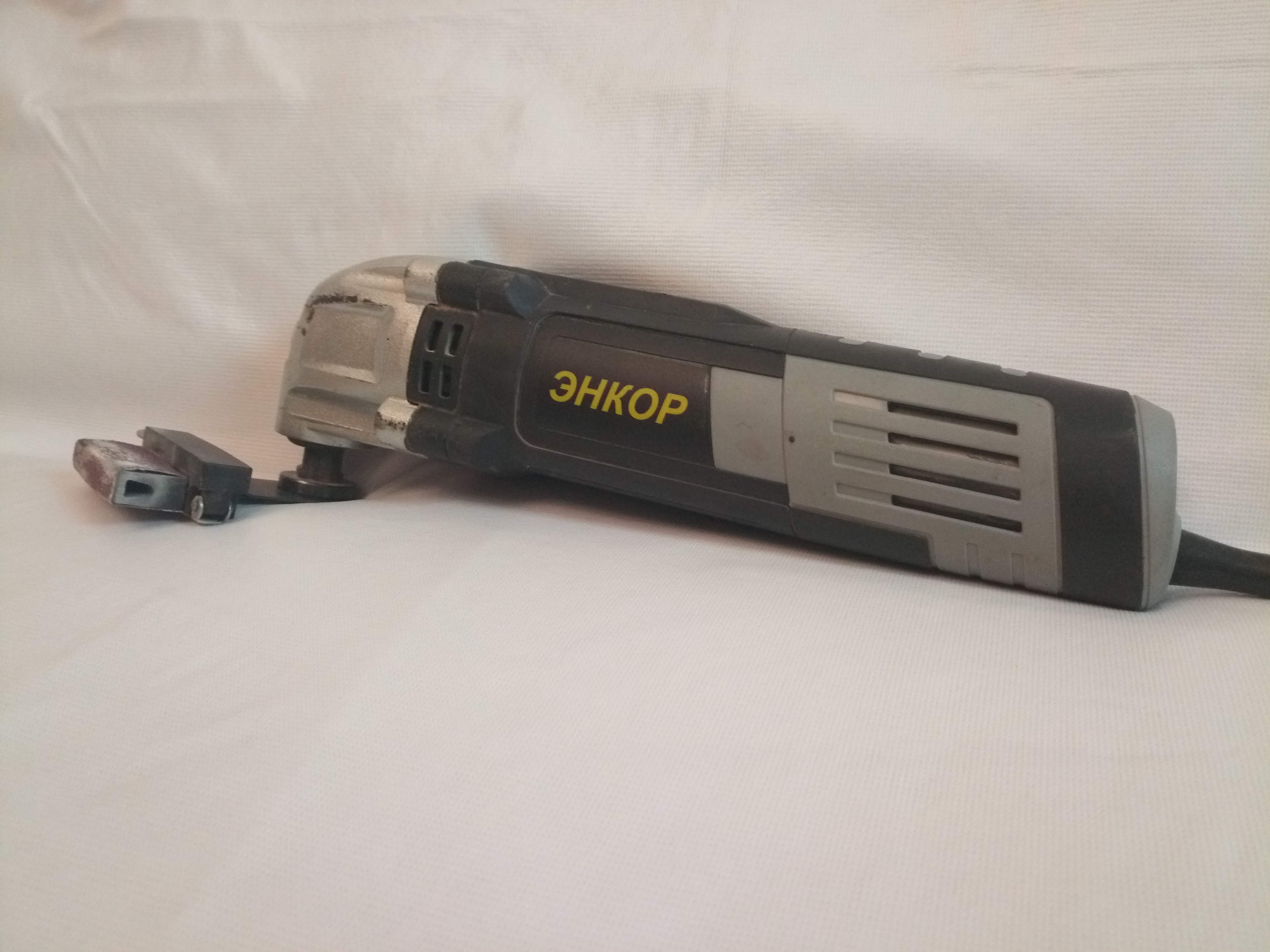 Универсальный резак с сетевым электроприводом